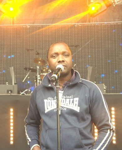 Petit pays. dernière répétition avant concert stade de france